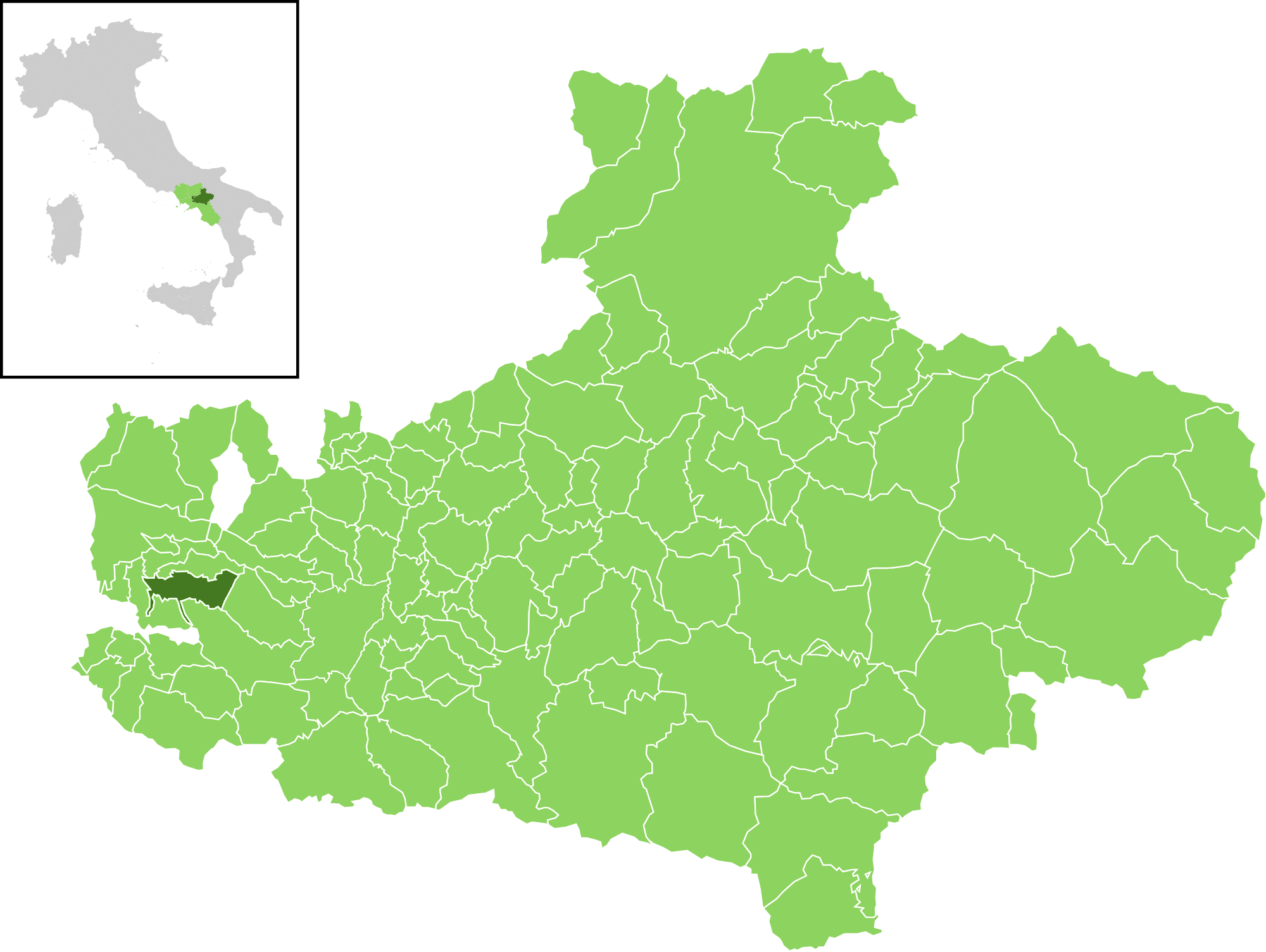 Posizione del comune all'interno della provincia di Avellino